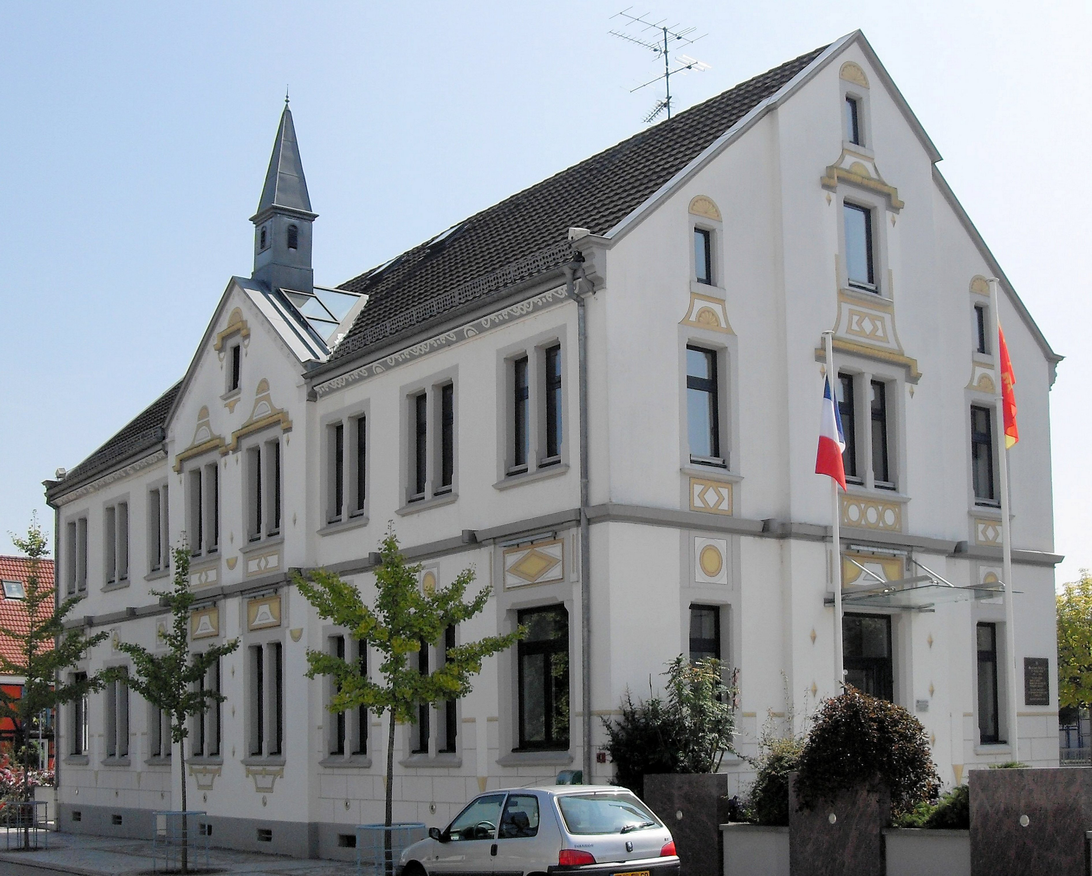 La mairie de Hésingue